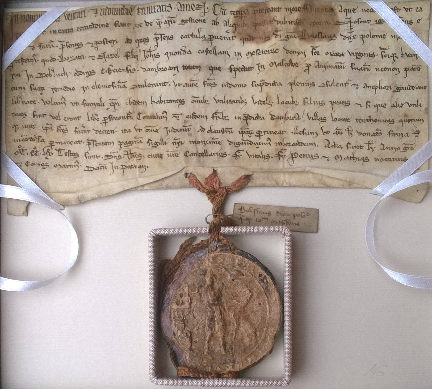 Bolesław Pobożny, książę wielkopolski zaświadcza, że Bozata i Nazel, synowie zmarłego kasztelana międzyrzeckiego, Jana, klasztorowi cystersów w Dobryługu ofiarowali całą Dąbrowę, należącą do [dziedziny, zwanej] Mascowe. Ze swej strony książę dozwala klasztorowi w Dąbrowie tej na dowolnym prawie lokować wsie niemieckie, z tym że całe sądownictwo. Pieczęć.